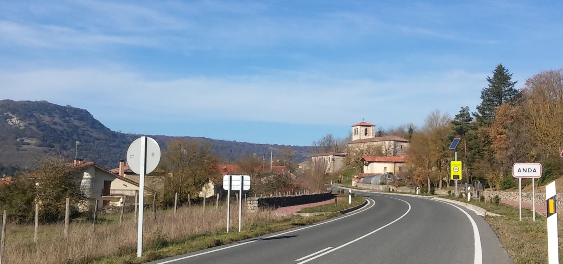 Anda herriaren ikuspegia (Kuartango)